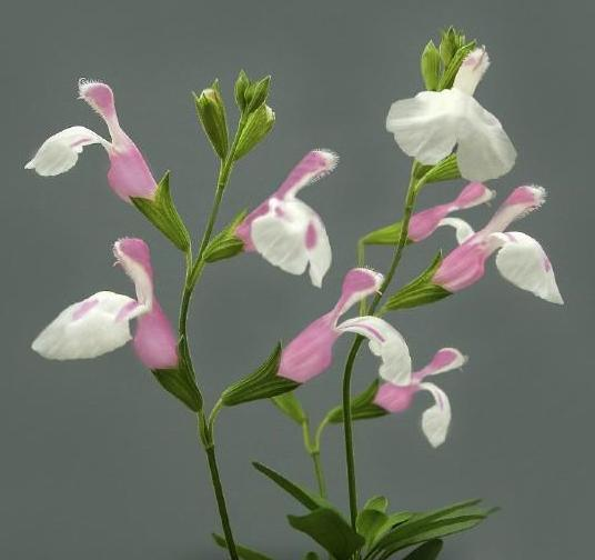 Autumn Sage 'Teresa' (Salvia greggii)